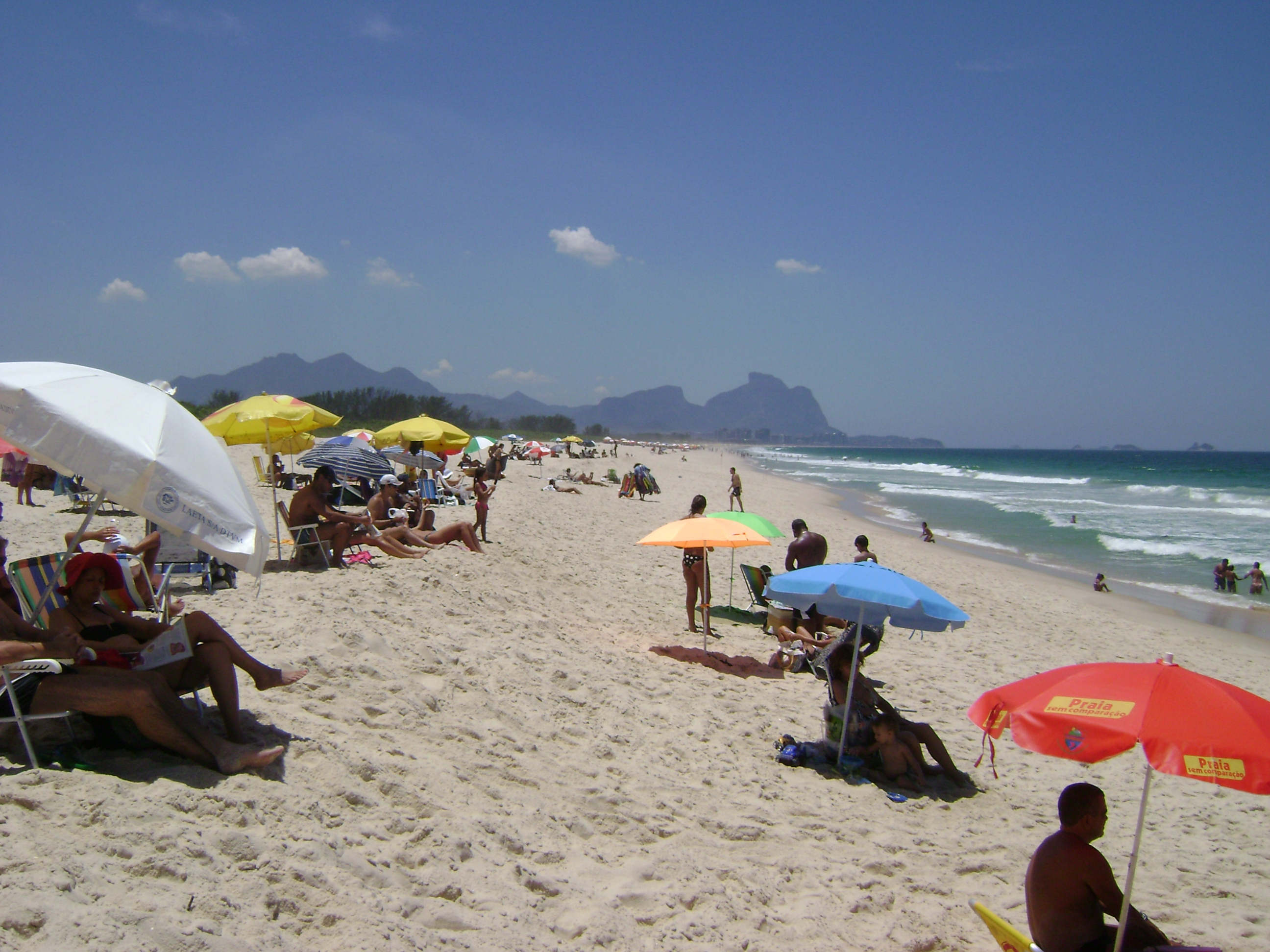 Praia na Barra da Tijuca, na cidade de Rio de Janeiro, Brasil.